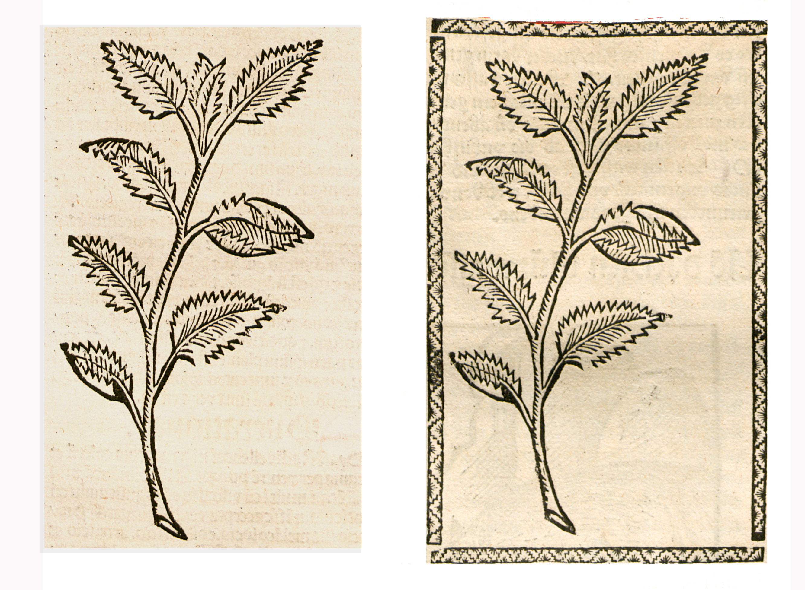 Abbildung von: Taubnessel